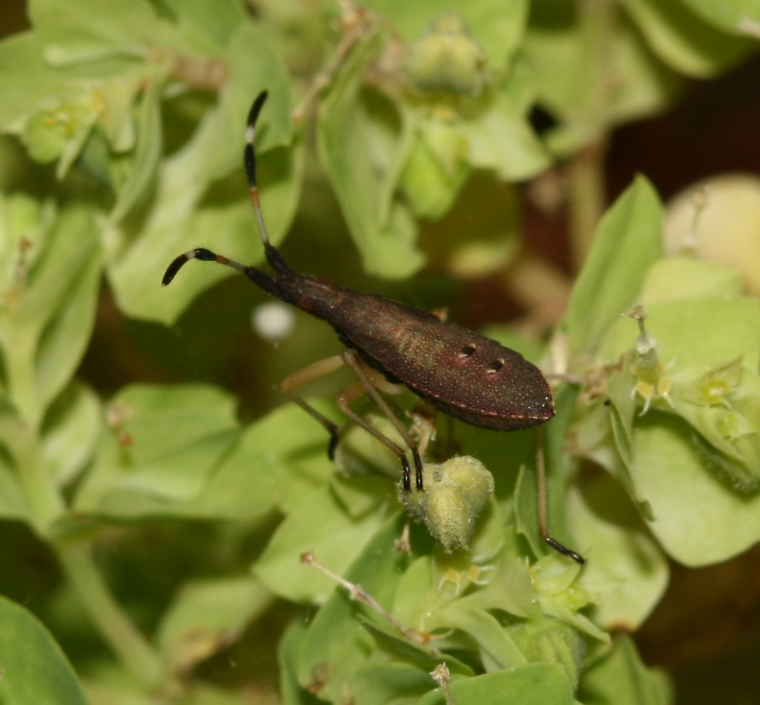 Argaka, Cyprus